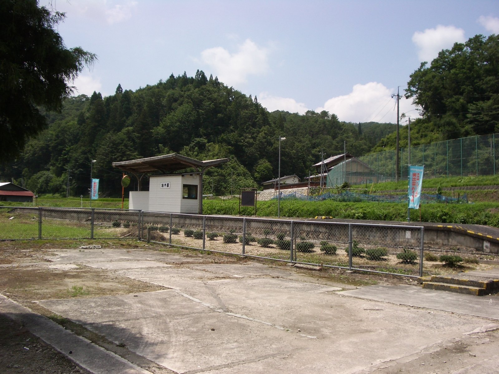 2005年8月4日撮影 撮影者-Charles's Wain